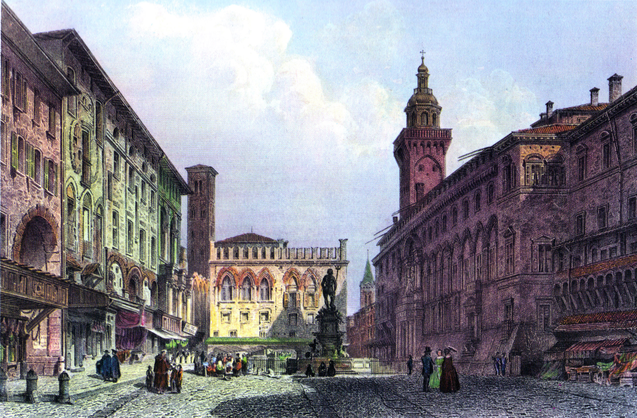 The Piazza Maggiore (main square) in Bologna, around 1855